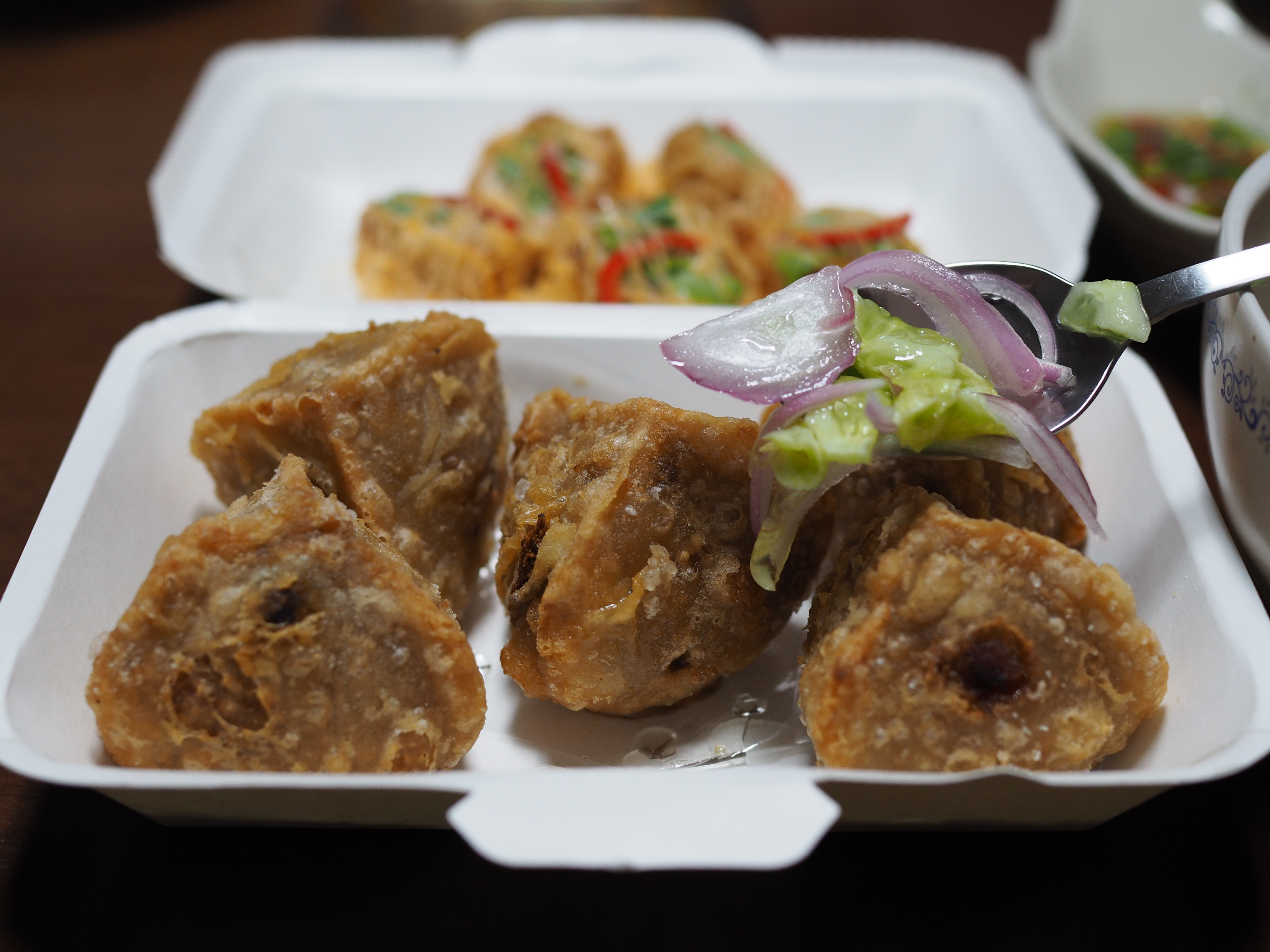 ค้างคาวเผือกและอาจาด